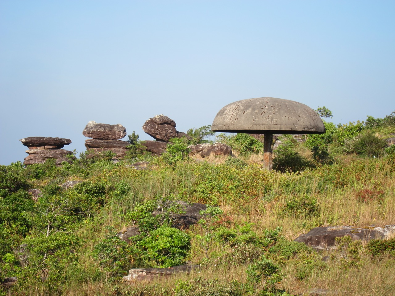 Face au Bokor Palace